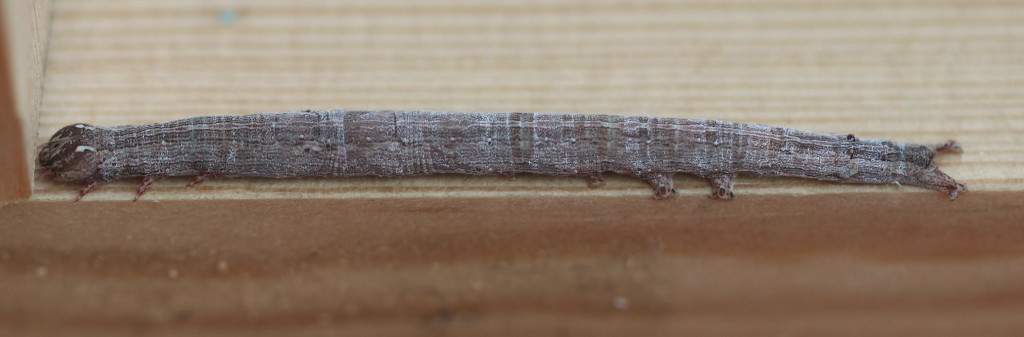 Raupe Dysgonia algira, gefunden an einem Brombeerstrauch am 6. September 2019 in der Schwetzinger Hardt